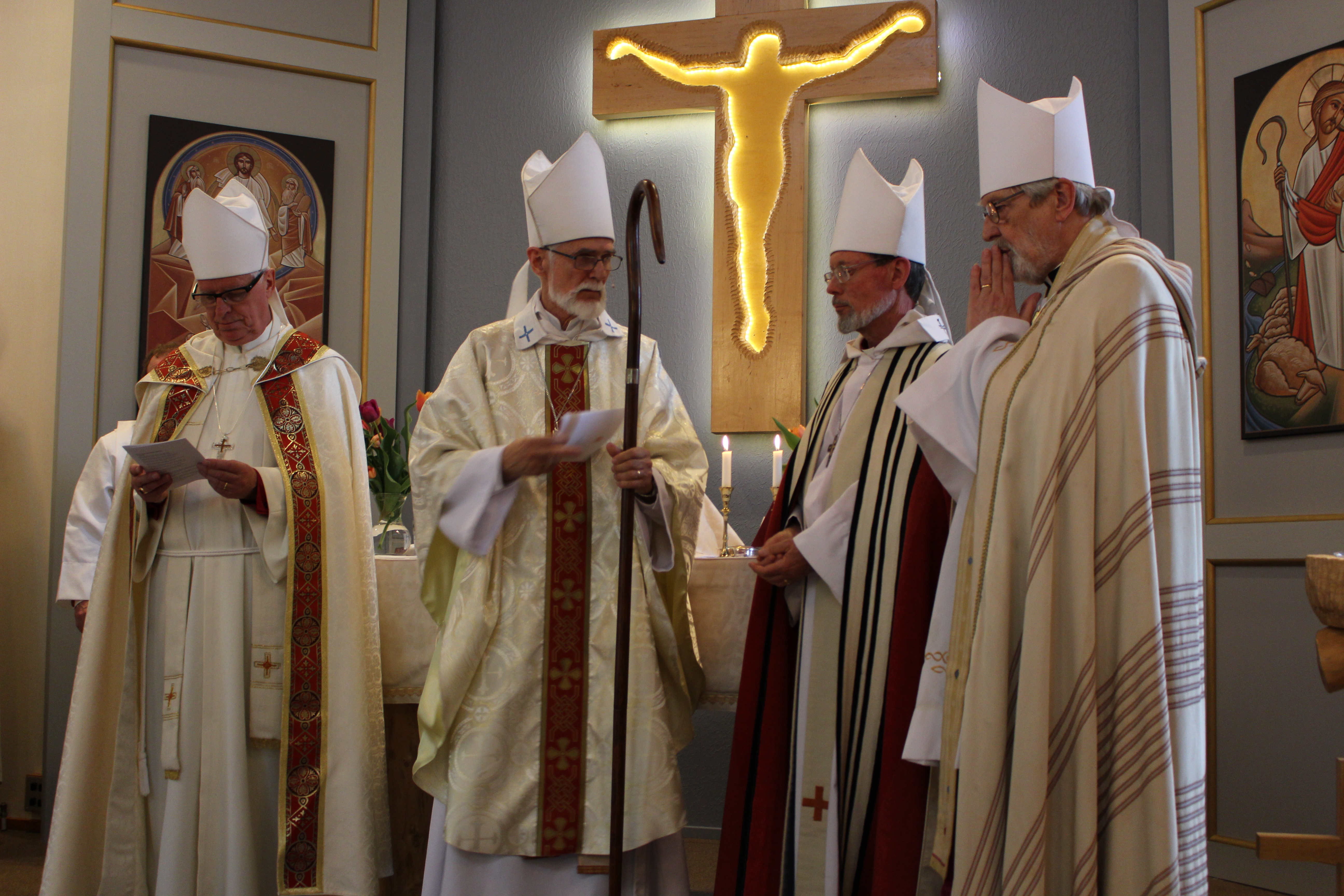 Biskoparna Roland Gustafsson, Bengt Ådahl, Lars Artman och Göran Beijer vid Bengt Ådahls biskopsvigning.